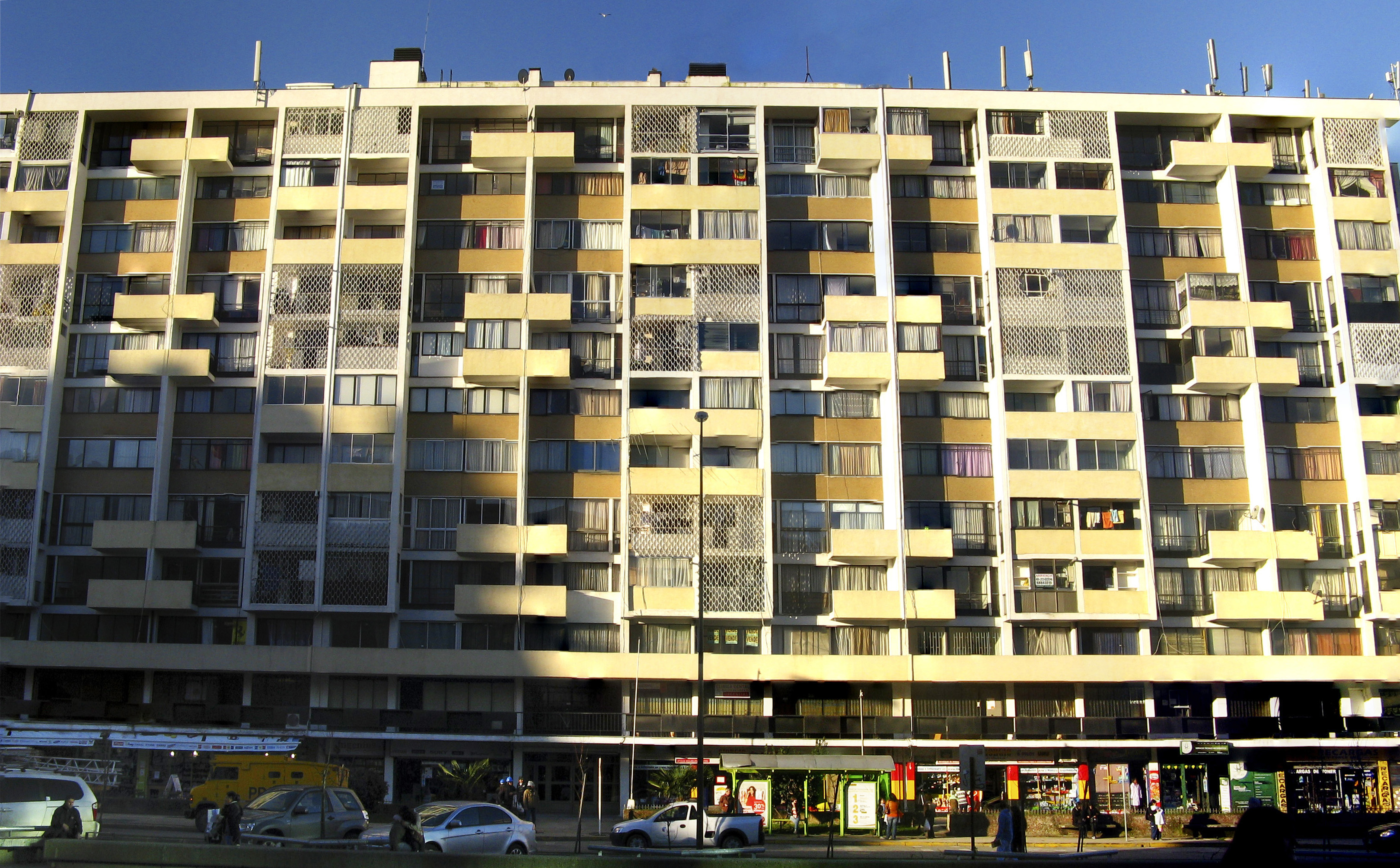 Edificio Tucapel Concepción, Chile Julio de 2012